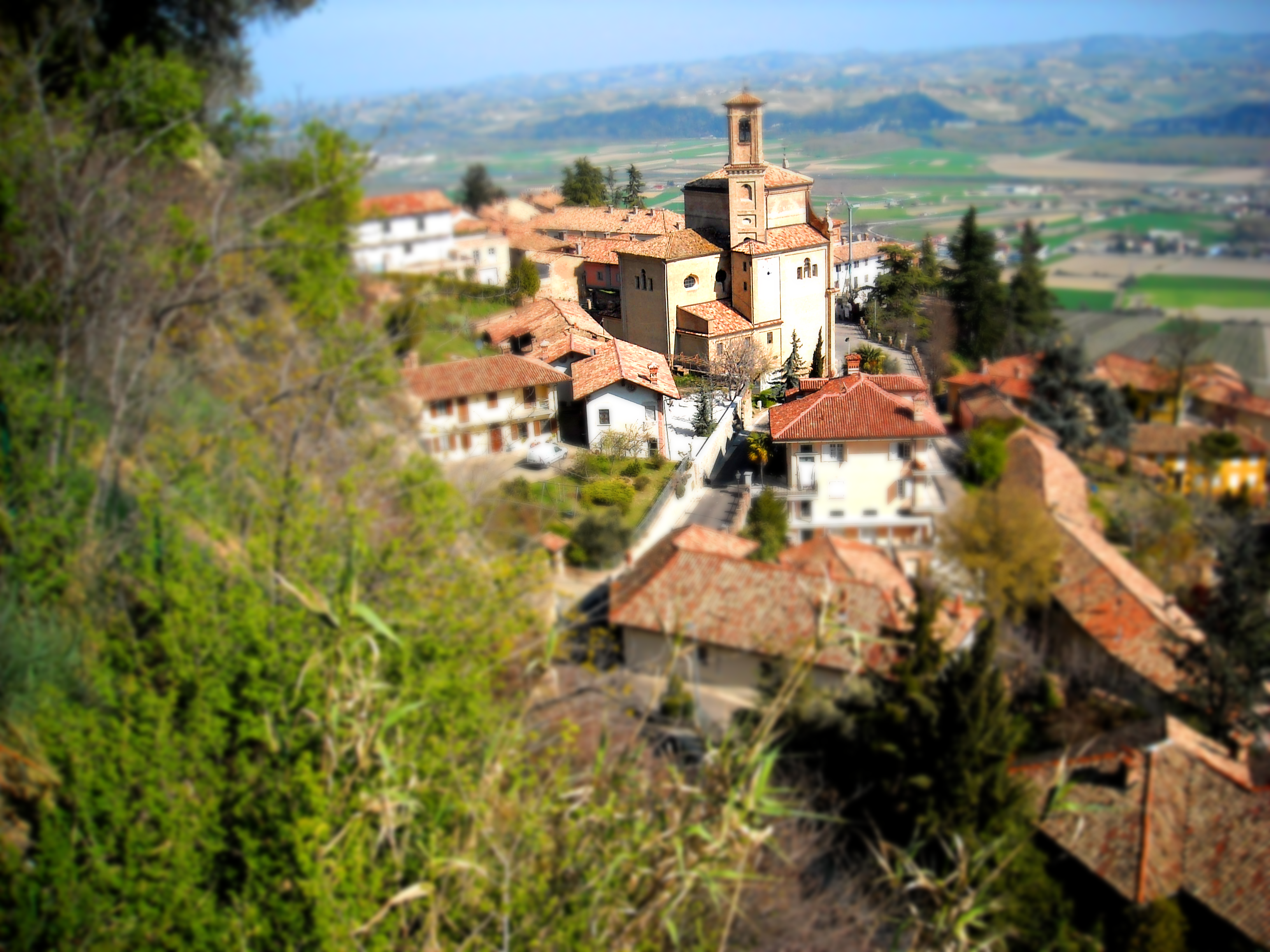 Chiesa della SS Annunziata, Guarene - CN, Italy